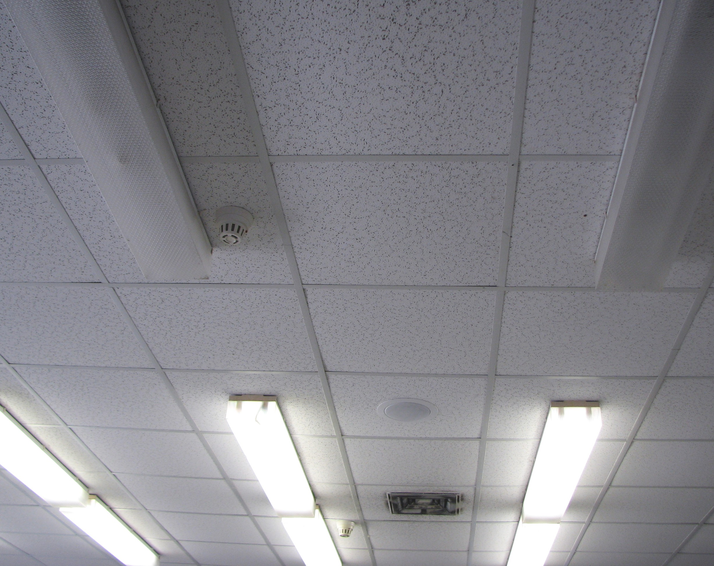 Suspended (aka dropped) ceiling.